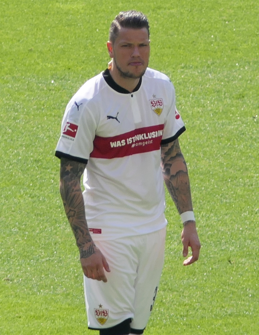 Der Fussballprofi Daniel Ginczek im Trikot vom VfB Stuttgart beim Heimspiel gegen den SV Werder Bremen am 21.04.2018.